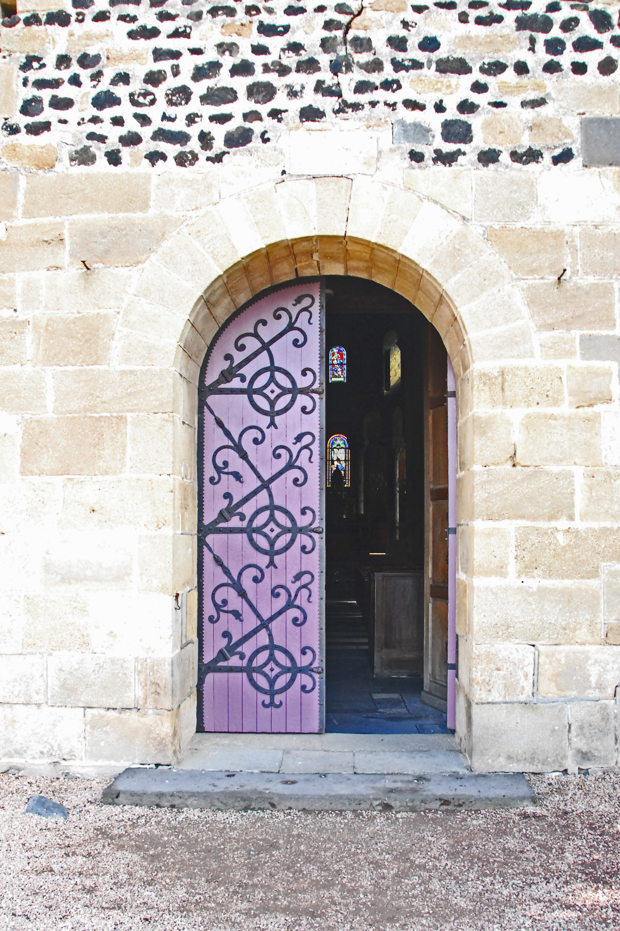 St-Saturnin Puy-de-Dôme), Hauptportal in Fassade